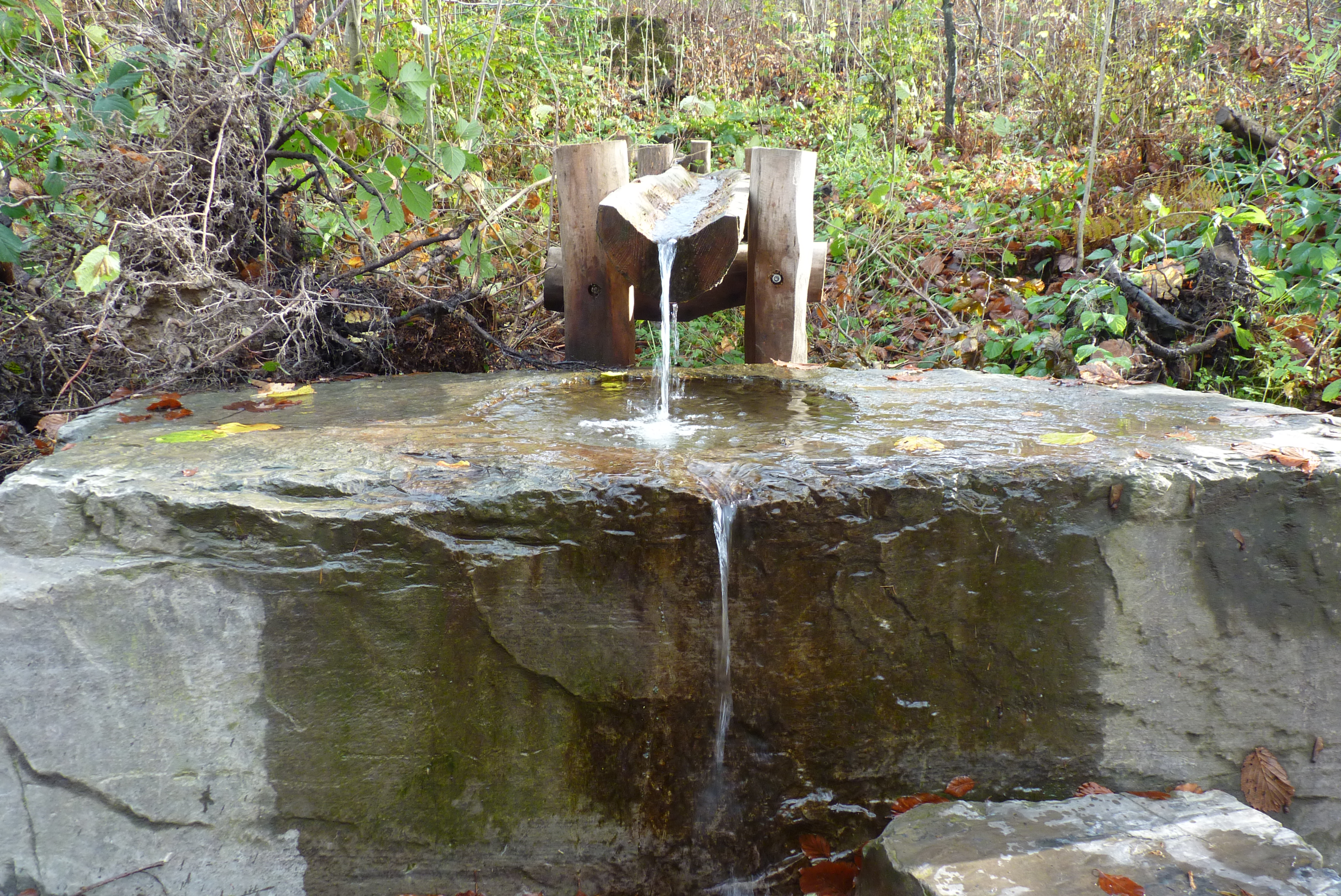 Die Wasserentnahmestelle an der Siegquelle im Herbst 2013